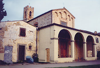 Pieve di Santo Stefano a Campoli. Comune di San Casciano in Val di Pesa